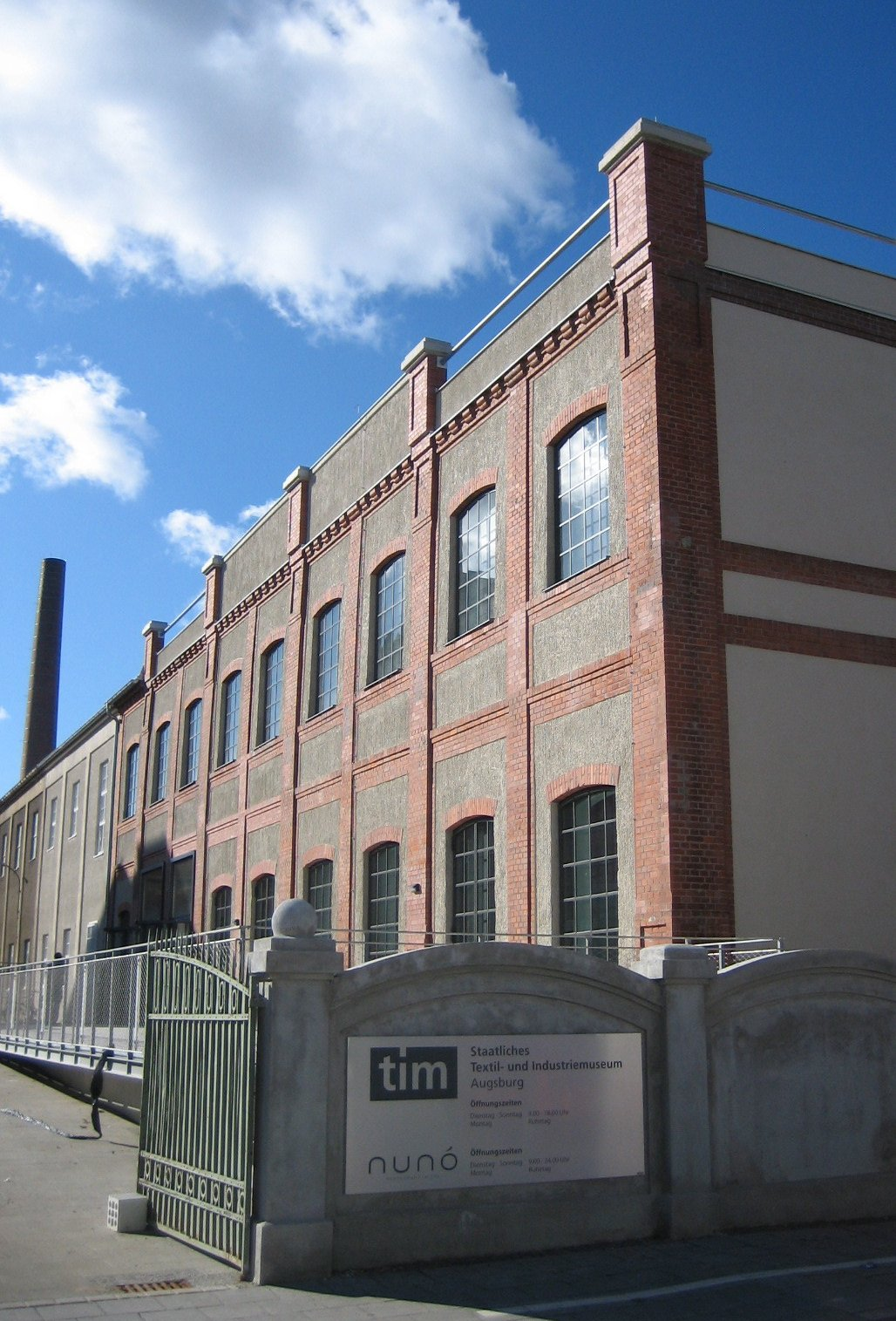 Zugang zum Staatlichen Textil- und Industriemuseum in Augsburg